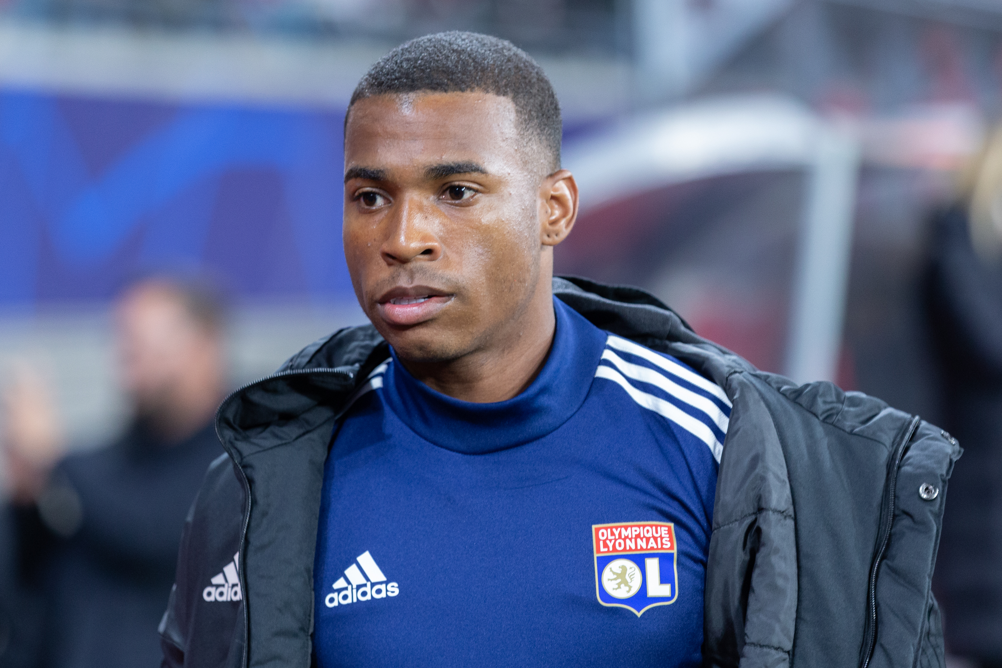 Fußball, Männer, UEFA Champions League, RB Leipzig - Olympique Lyonnais; Jean Lucas (Olympique Lyonnais, 22); Porträt, Einzelbild